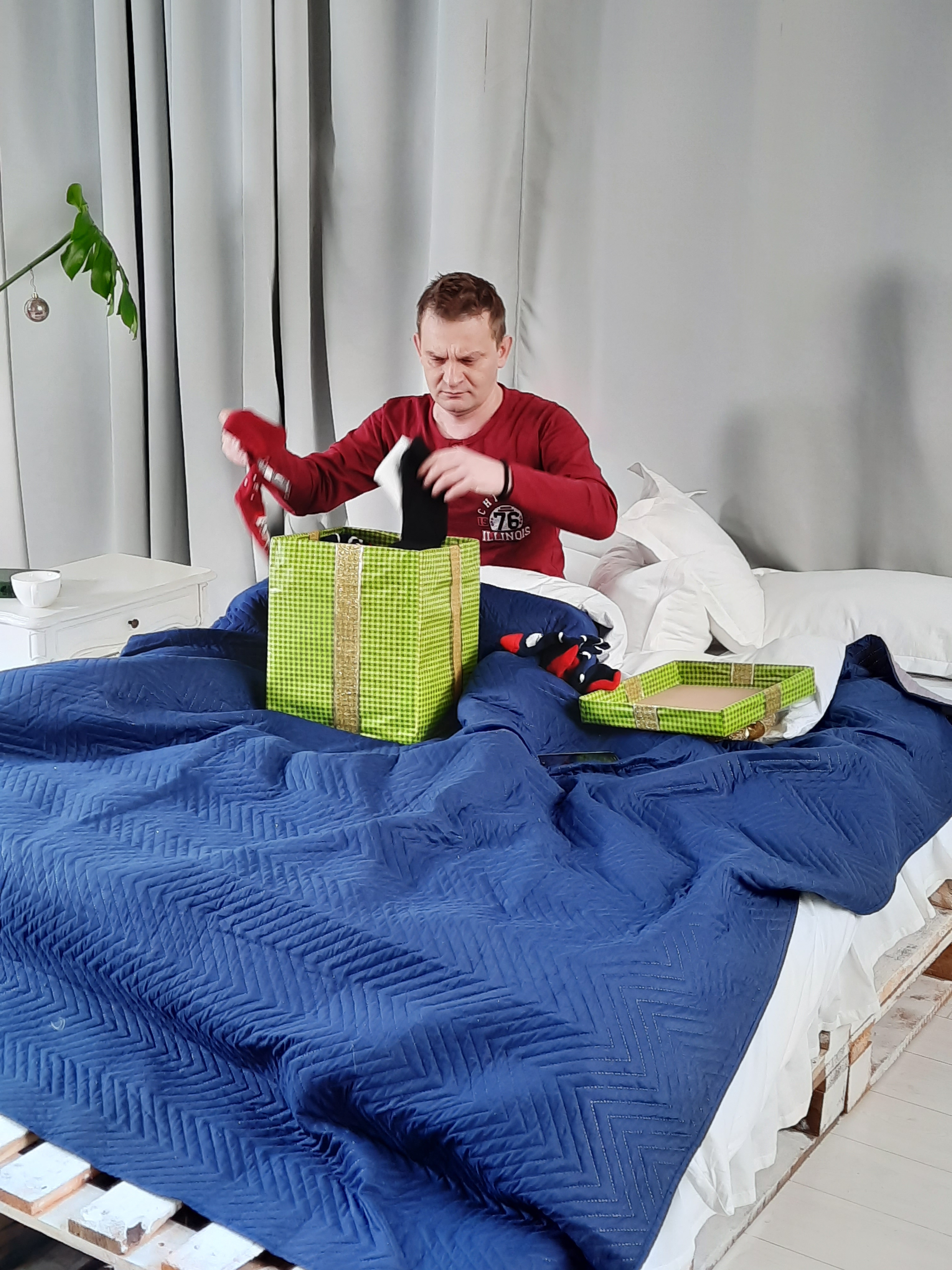 Бекстейдж